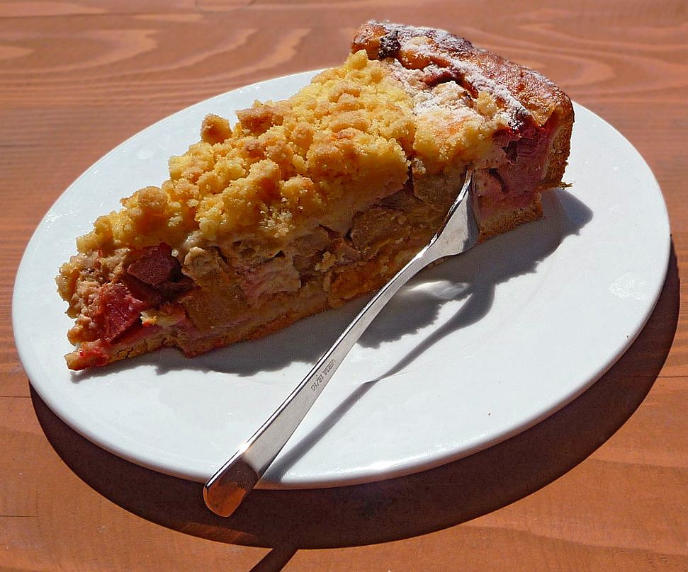 Stück Rhabarberkuchen (aus Rheum rhabarbarum) mit Streuseln, daneben eine Tasse Cappuccino